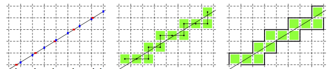 Lien entre suite de coupure et mots mécaniques supérieurs et inférieurs